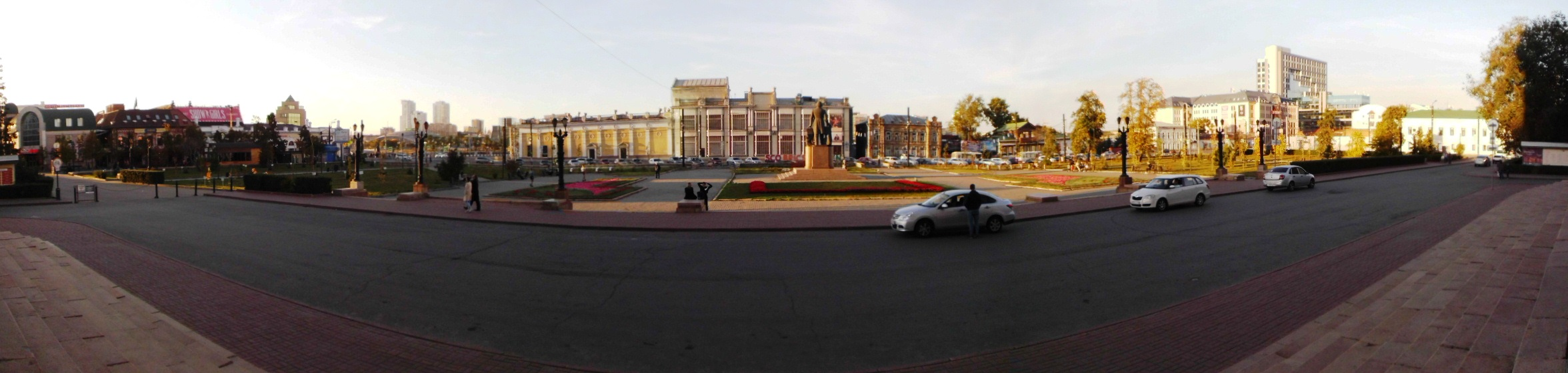 Место возникновения Челябинска. Здесь проходили расправа над пугачевцами, митинги и демонстрации рабочих, «бабий бунт»: площадь Ярославского; улица Труда, ограниченная рекой Миасс и театром оперы и балета им. Глинки, Челябинск, Челябинская область. Вид от театра им. Глинки (южная сторона площади). Панорамный снимок. На фото: улица Труда справа налево за памятником; пересечение улицы Труда и Кирова (переходит из проезжей части в пешеходную), на фото слева; пересечение улицы Труда и Цвиллинга (начало улицы), на фото справа. Посередине снимка здания слева направо: Челябинской филармонии, пассажа Яушевых, особняка Яушевых, дома Жуковского.